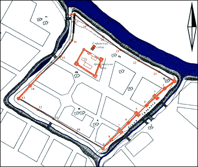 Схематический план Вологодской крепости в XVII веке (по реконструкции Н. В. Фалина). Красной штриховкой показаны каменные стены и башни, коричневым цветом – деревянные. Показаны кварталы застройки XX века